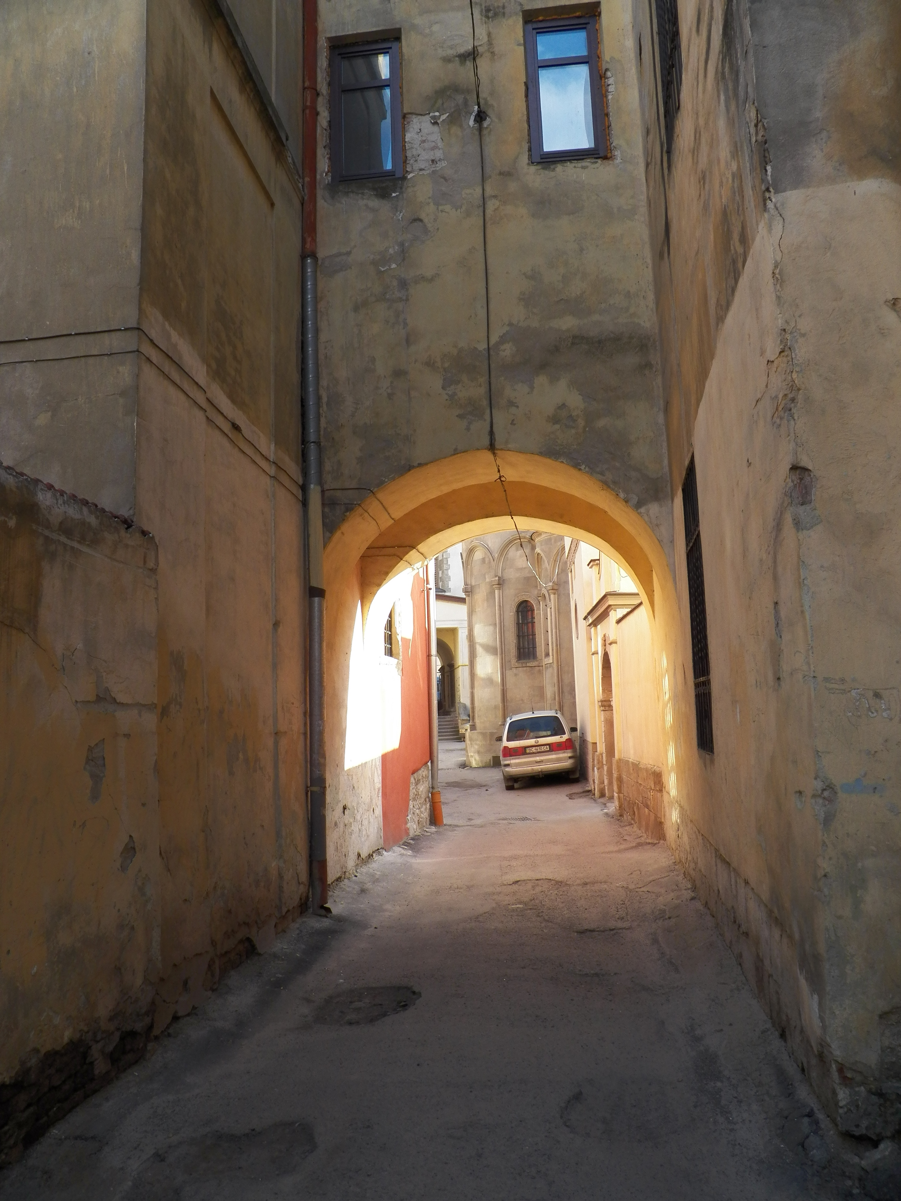 Вірменський собор - адміністративний будинок (Вірменський банк), Львів, Вірменська, 7/9